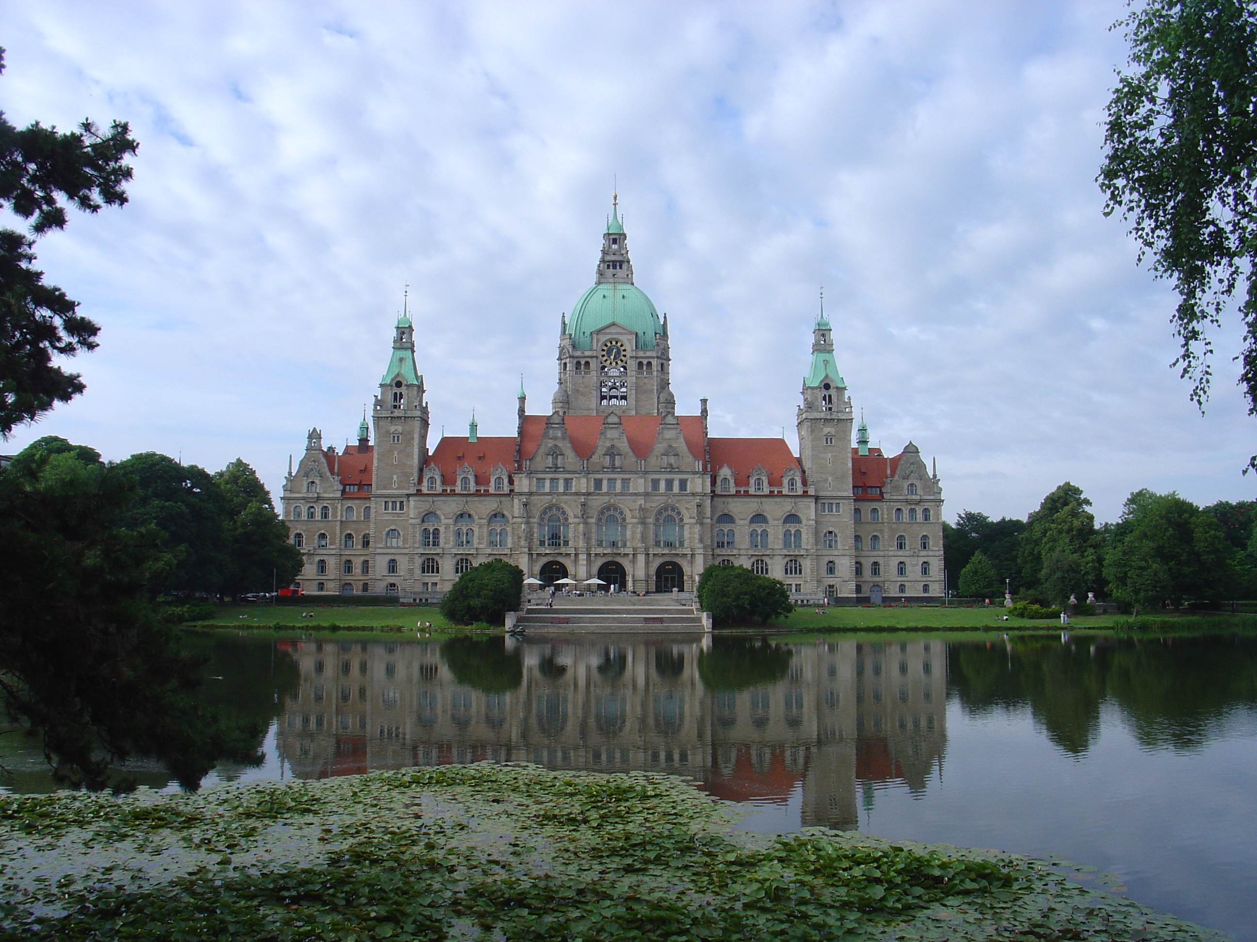 Das Neue Rathaus von Hannover, Niedersachsen, Deutschland.